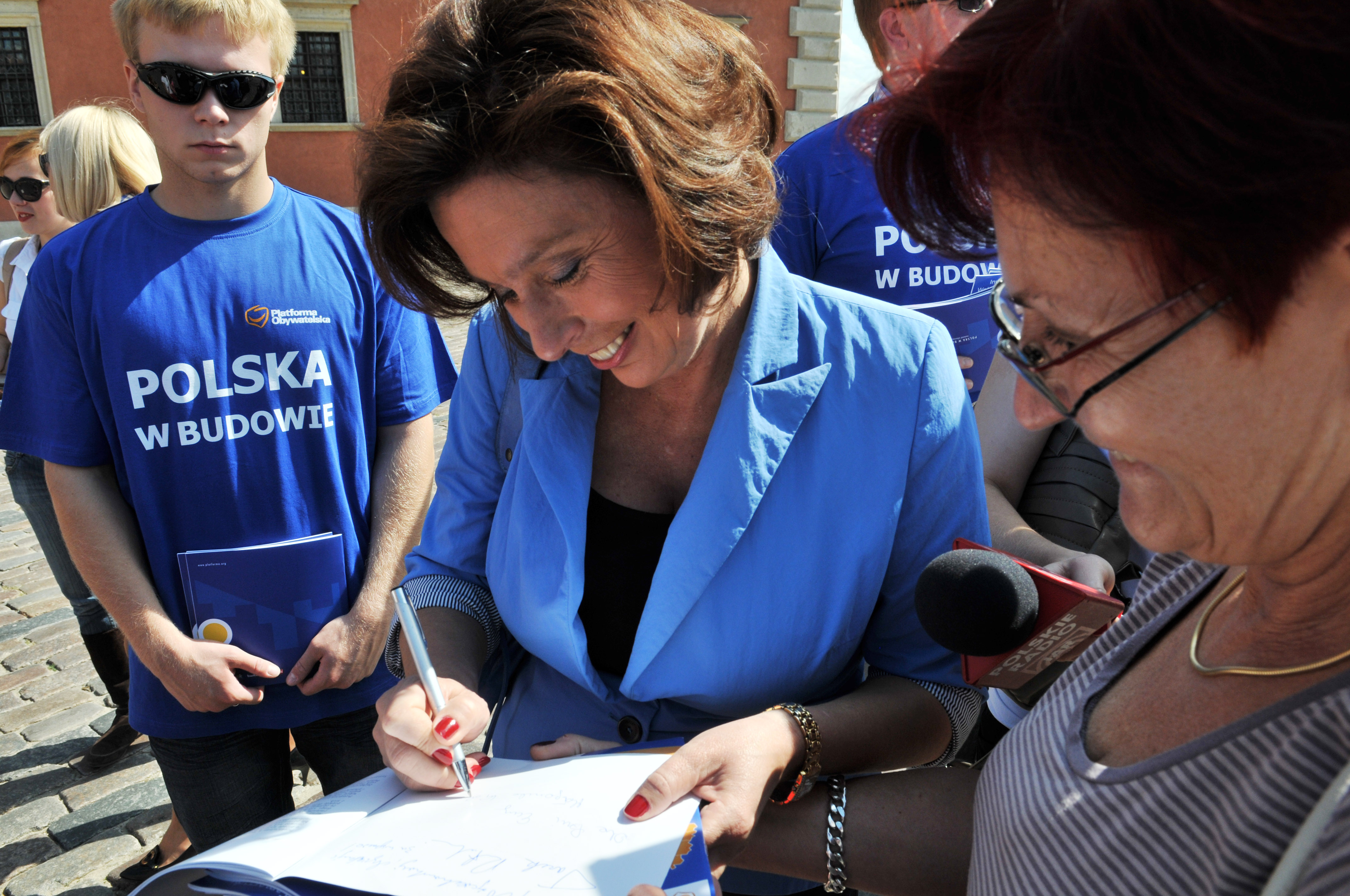 03.09.2011, Błękitna Sobota w Warszawie